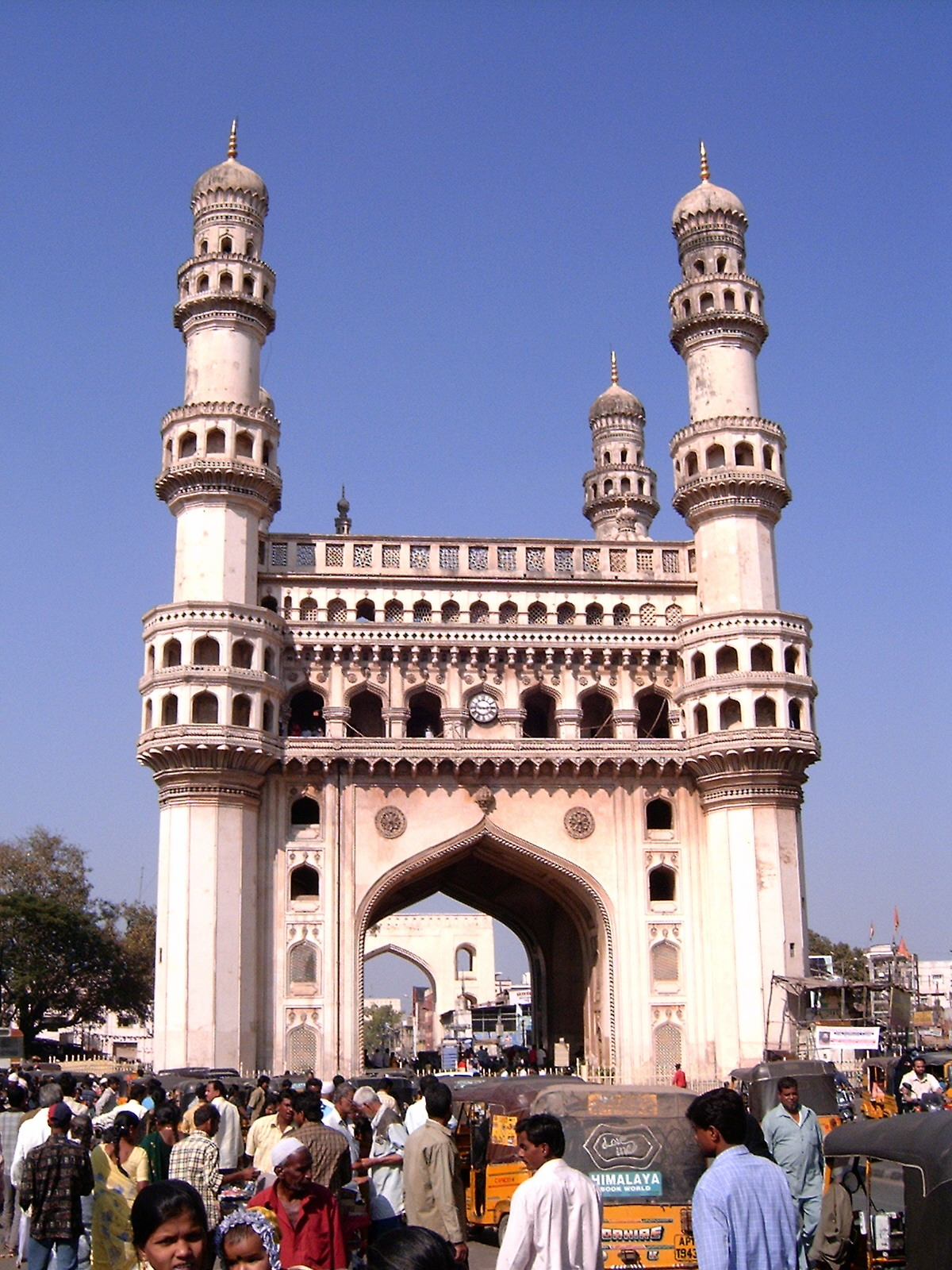 De Chaminar van Haidrabad